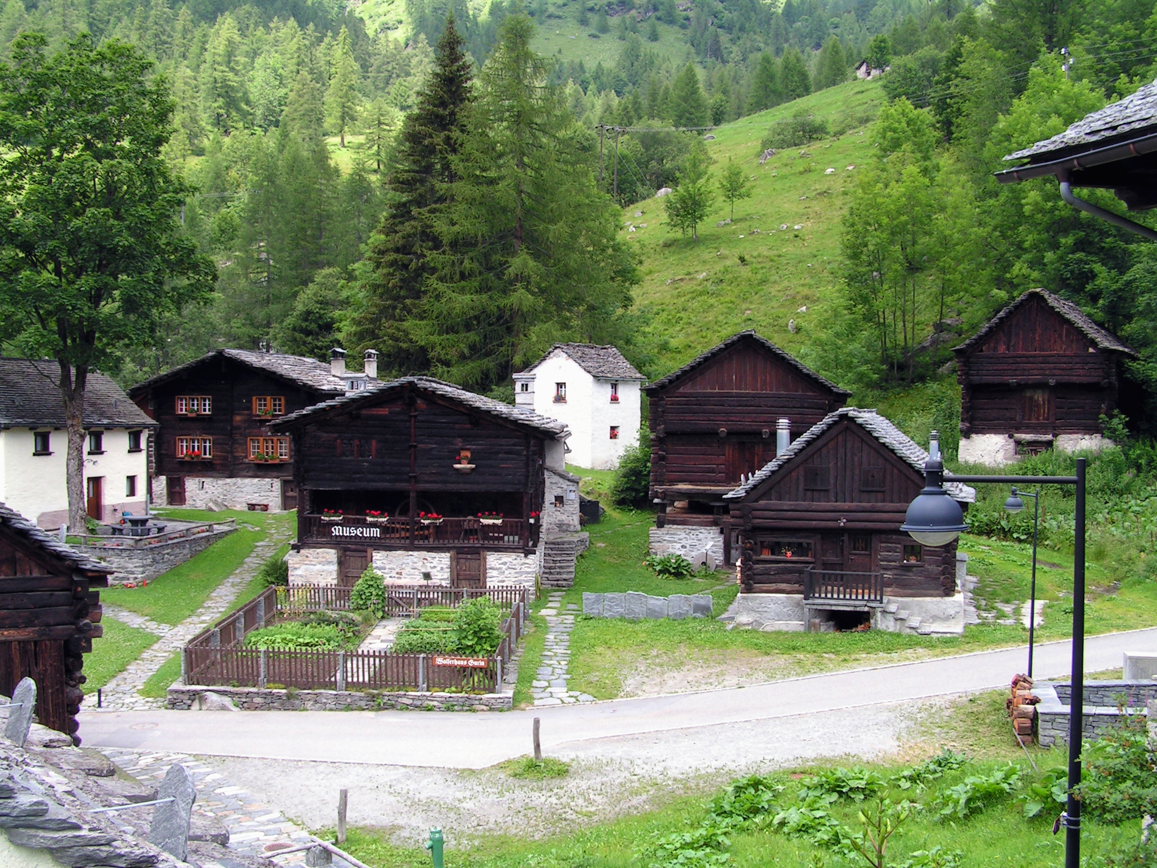 Vue d'ensemble du musée Walserhaus à Bosco Gurin avec le jardin des variétés traditionelles et un raccard.